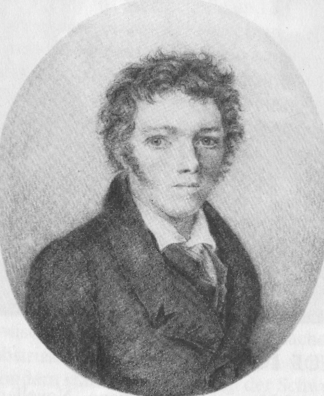 Wilhelm Hauff: Kreidezeichnung von J. Behringer